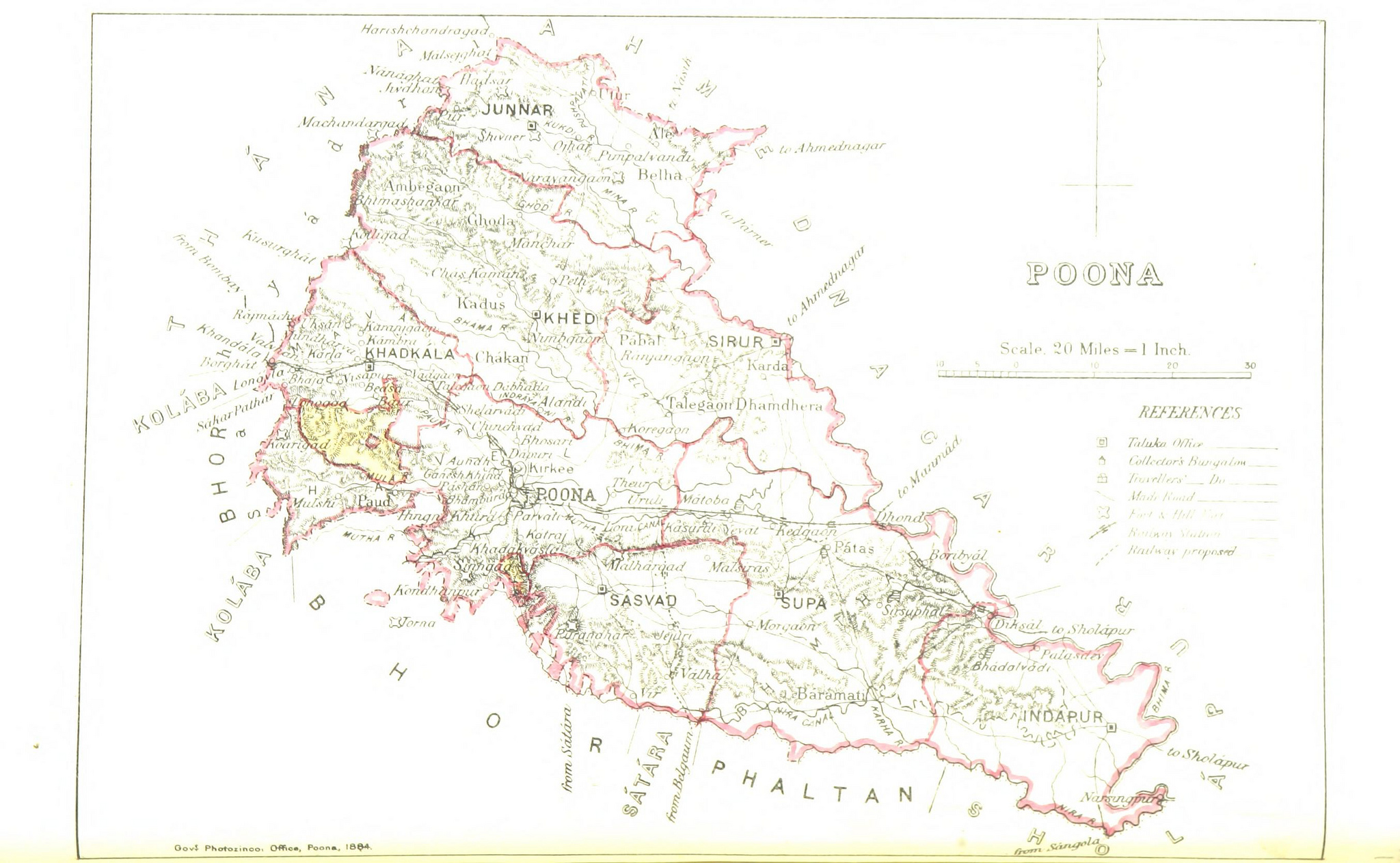 Poona 1896